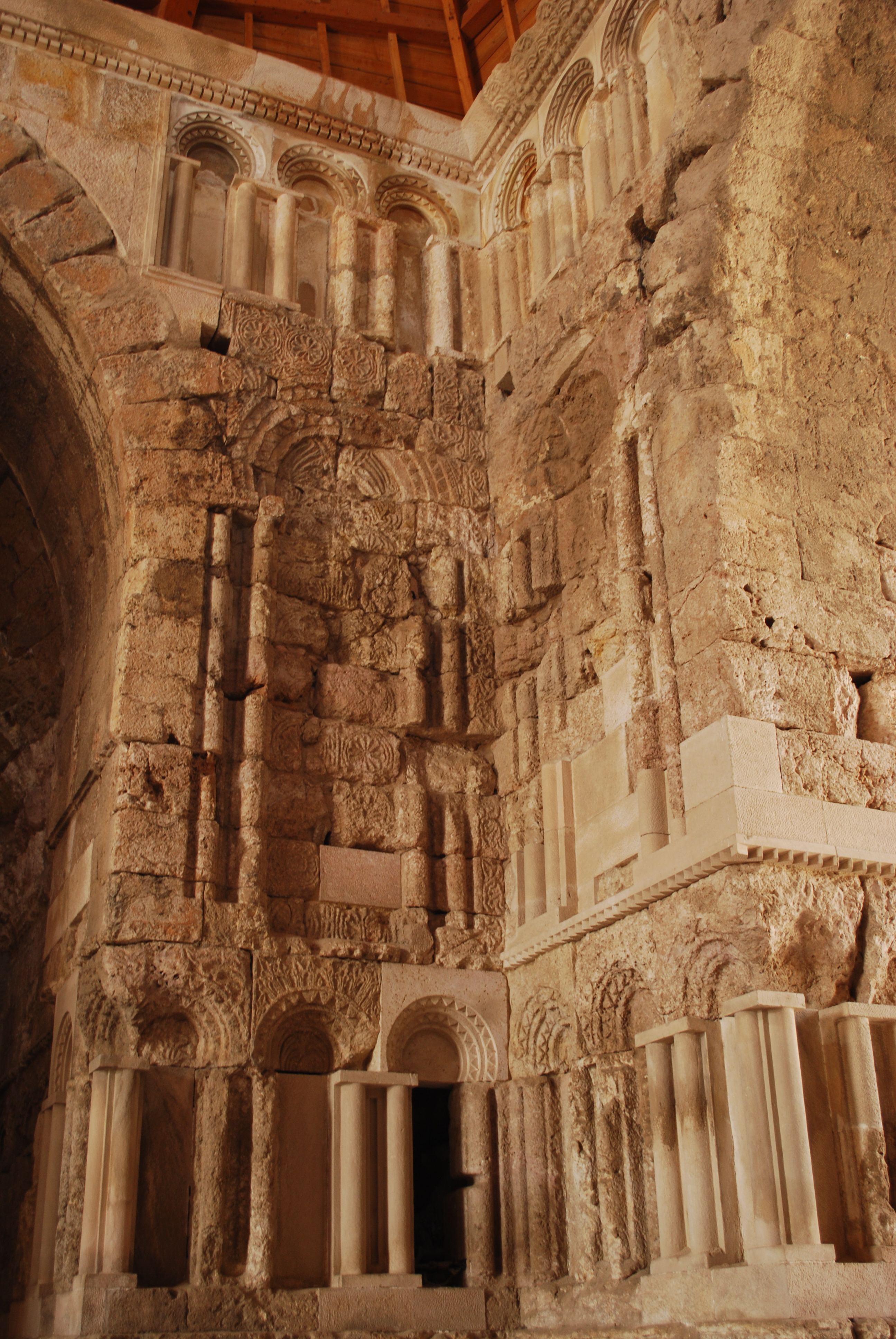 Le palais omeyyade de la Citadelle d'Amman.